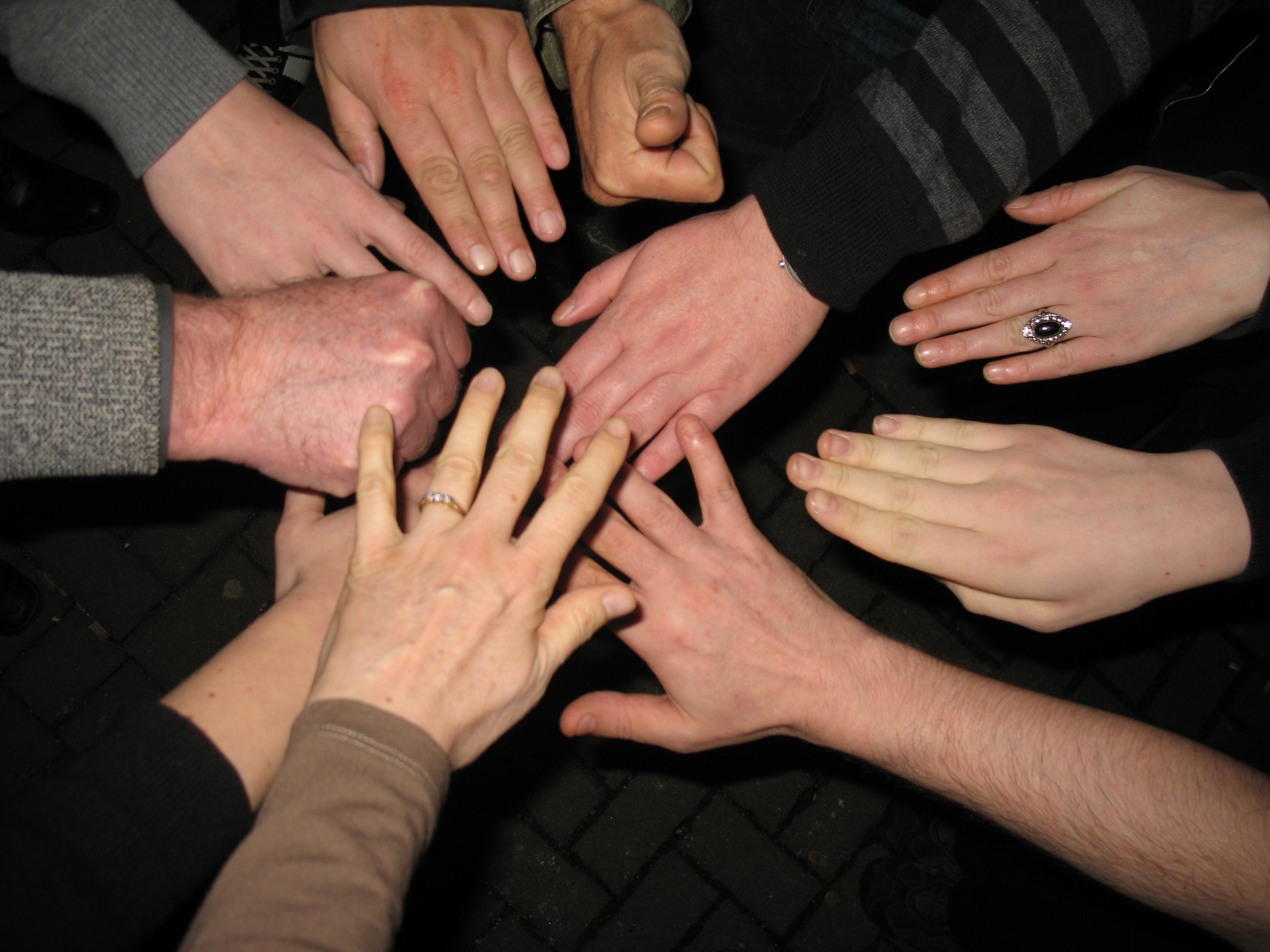 10 Jahre WP - 10 wikipedianische Hände